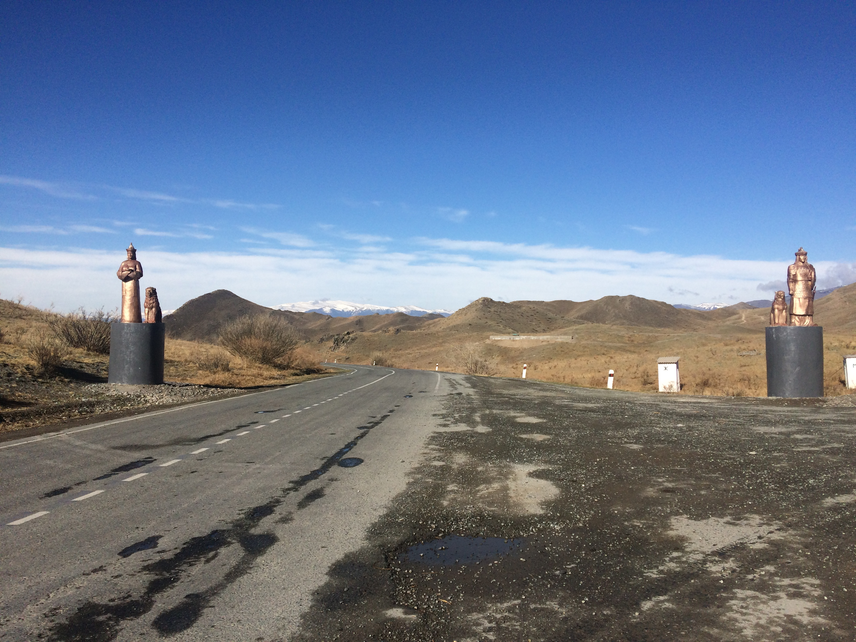 У въезда на Бай-Тайгинский кожуун Республики Тыва. Стоят памятники Сүбедею (Субэдэю) и хозяйке Бай-Тайги